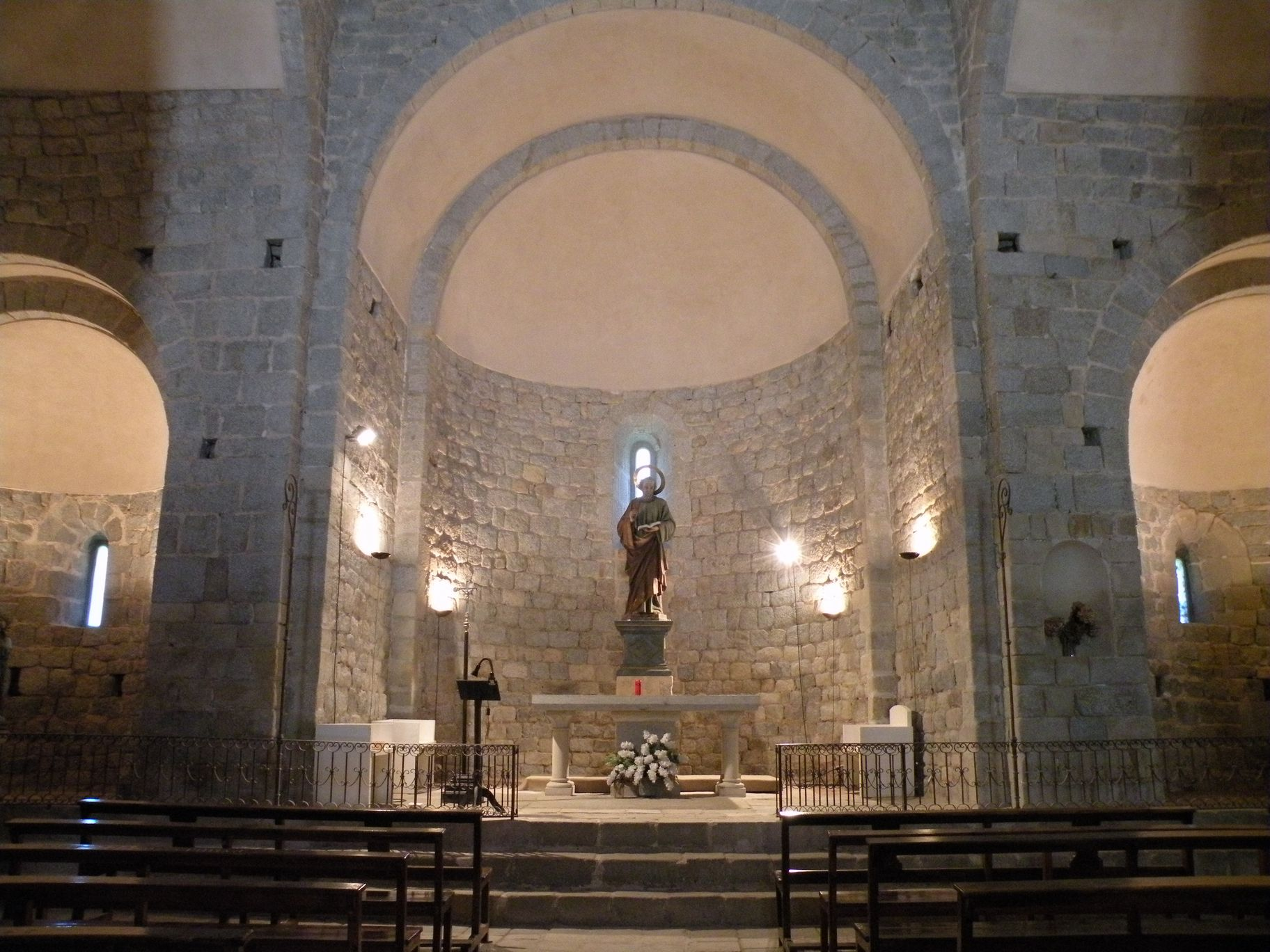 Interior de St Pere Cercada: l'absis